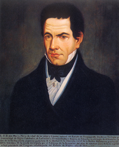 José María Luis Mora, óleo sobre tela, anónimo, ca. 1820-30. Museo Nacional de Historia, INAH. Imagen tomada del libro: Enrique González Pedrero, El país de un solo hombre. El México de Santa Anna, vol. I, La Ronda de los contrarios, México, FCE, 1993, p. 557.